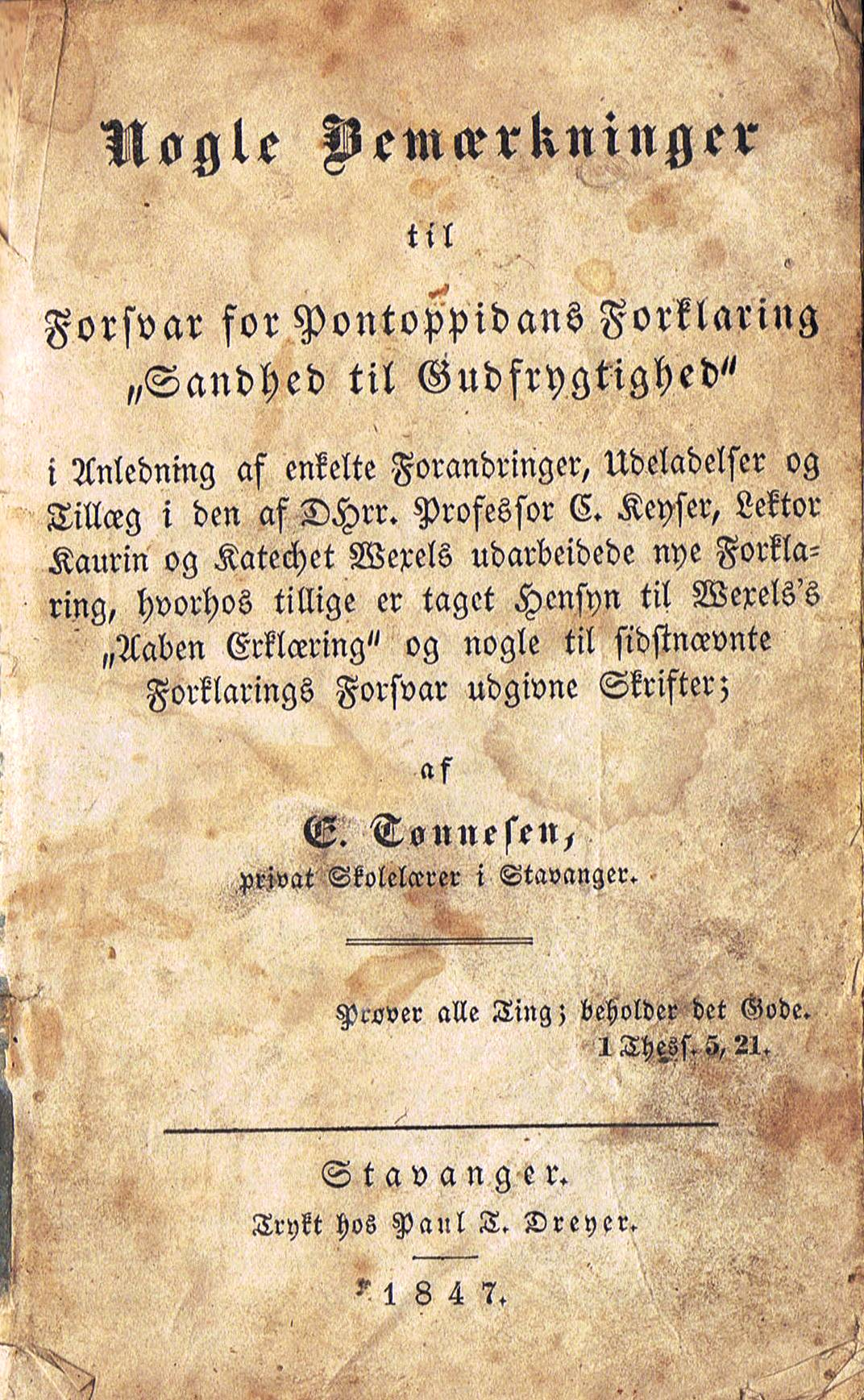 Forside til erik tønnesens bok fra 1847